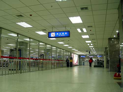 启程离开寒冷的天津，奔向温暖的南国。